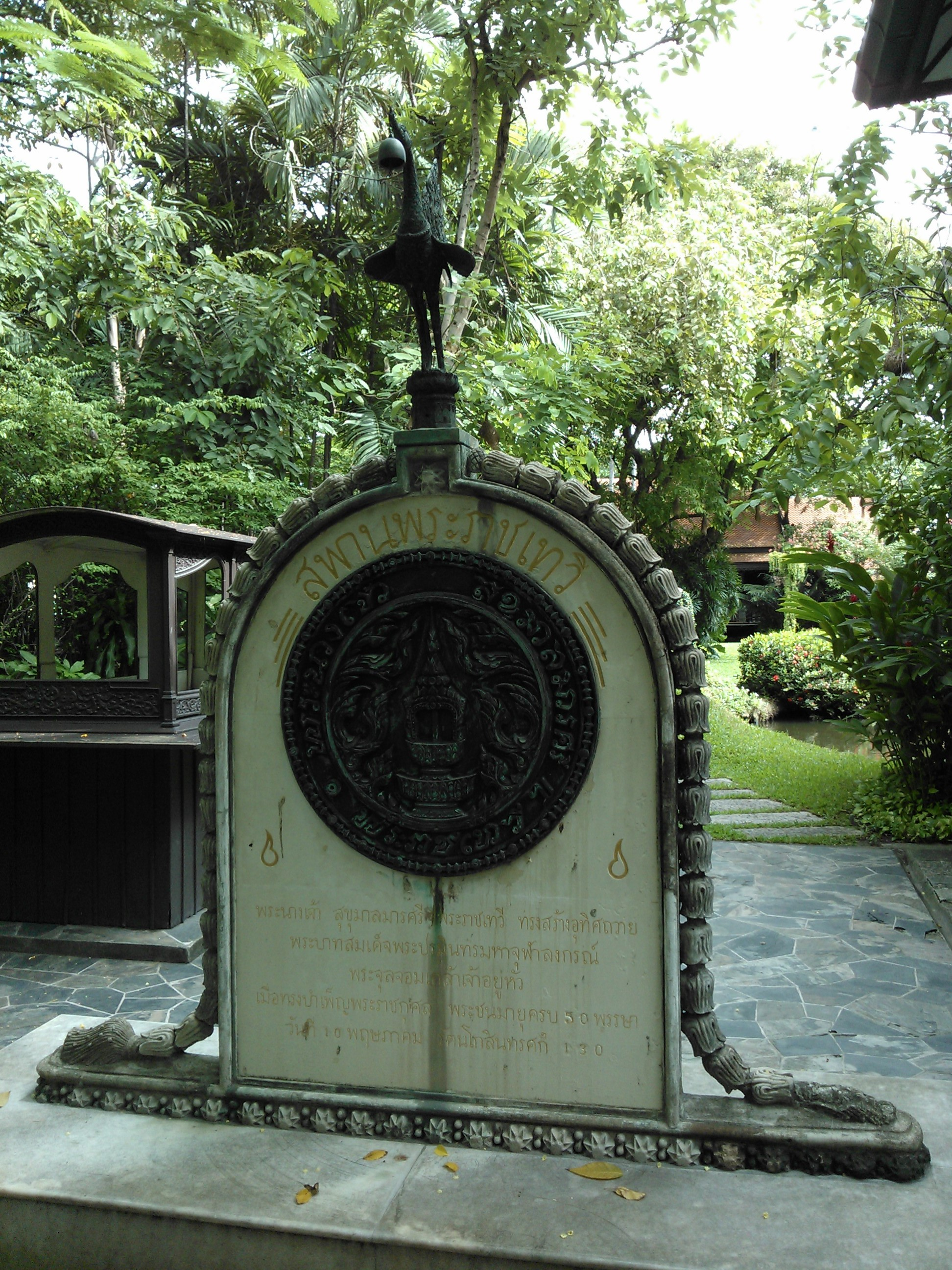 SUAN PAKKAD PALACE MUSEUM